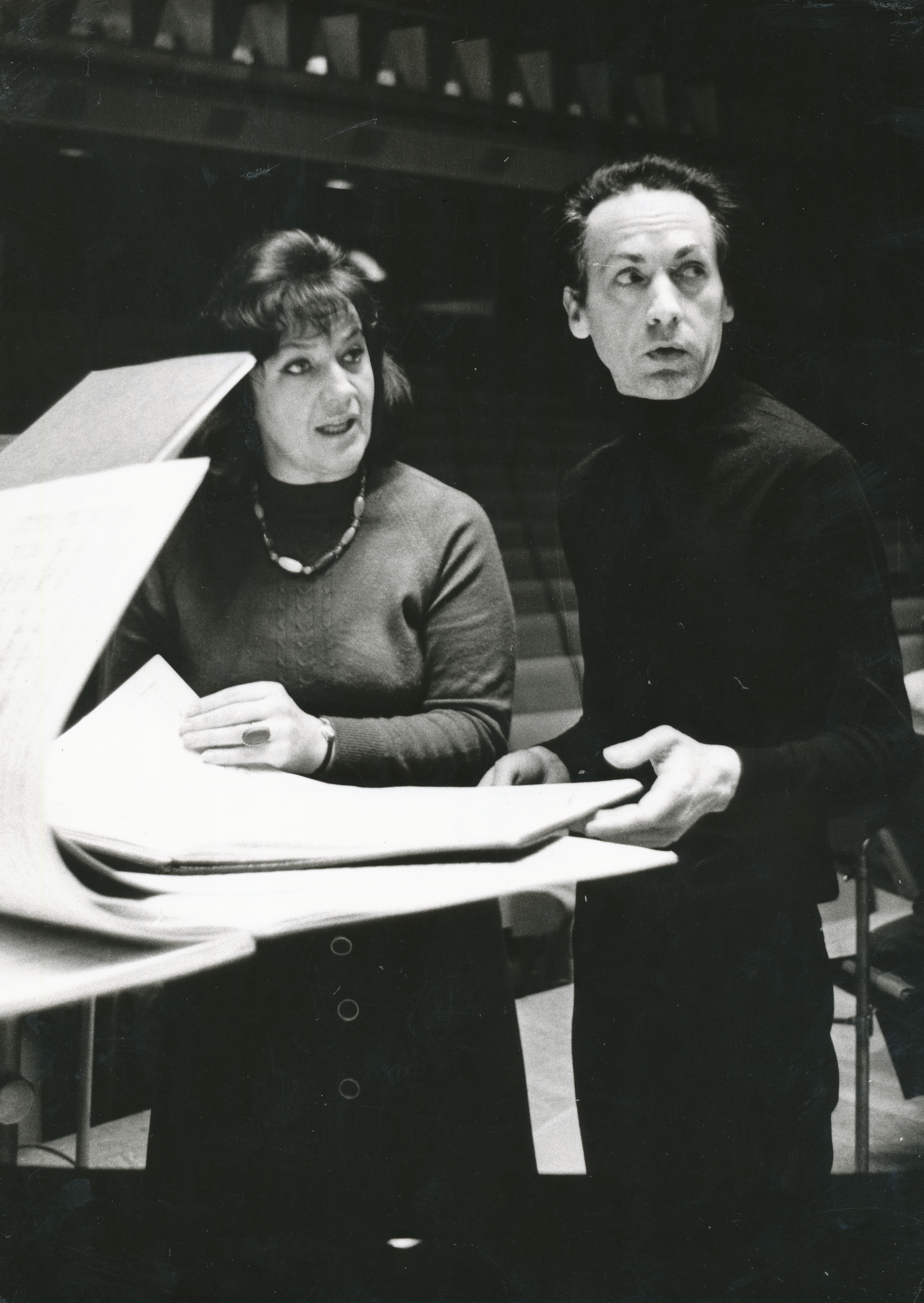 Polska śpiewaczka Krystyna Szostek-Radkowa przed paryskim prawykonaniem Judith Symphonie pour Mezzo Soprano et orchestre op. 21 z francuskim kompozytorem Jean Guillou Zdjęcie wykonane na zlecenie kompozytora i dedykowane ( na odwrocie odbitki ) Krystynie Szostek-Radkowej. Prawykonanie francuskie symfonii z udziałem Krystyny Szostek-Radkowej wraz z Orkiestrę Radia i Telewizji Francuskiej (ORTF) pod dyr. Renarda Czajkowskiego miało miejsce w Paryżu 25 lutego 1971, ale z informacji udzielonej przez p. Szostek-Radkową wynika, że prawykonanie światowe miało miejsce w 1970 r. na Wawelu w Krakowie, też z jej udziałem.